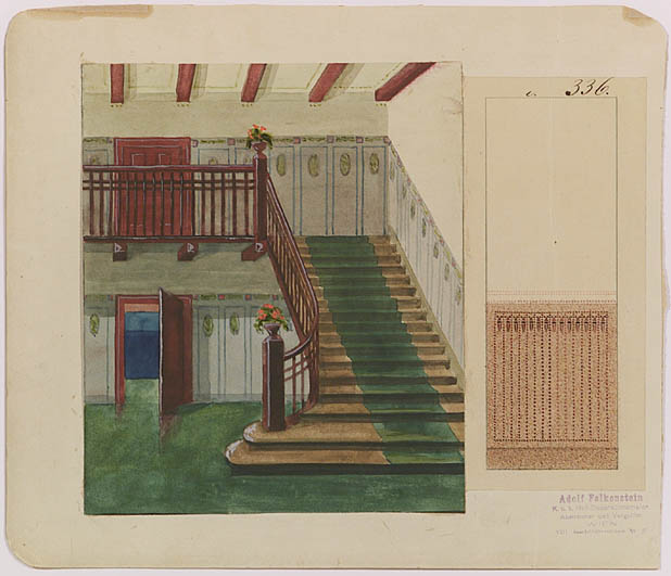 Entwurf für eine Stiege.